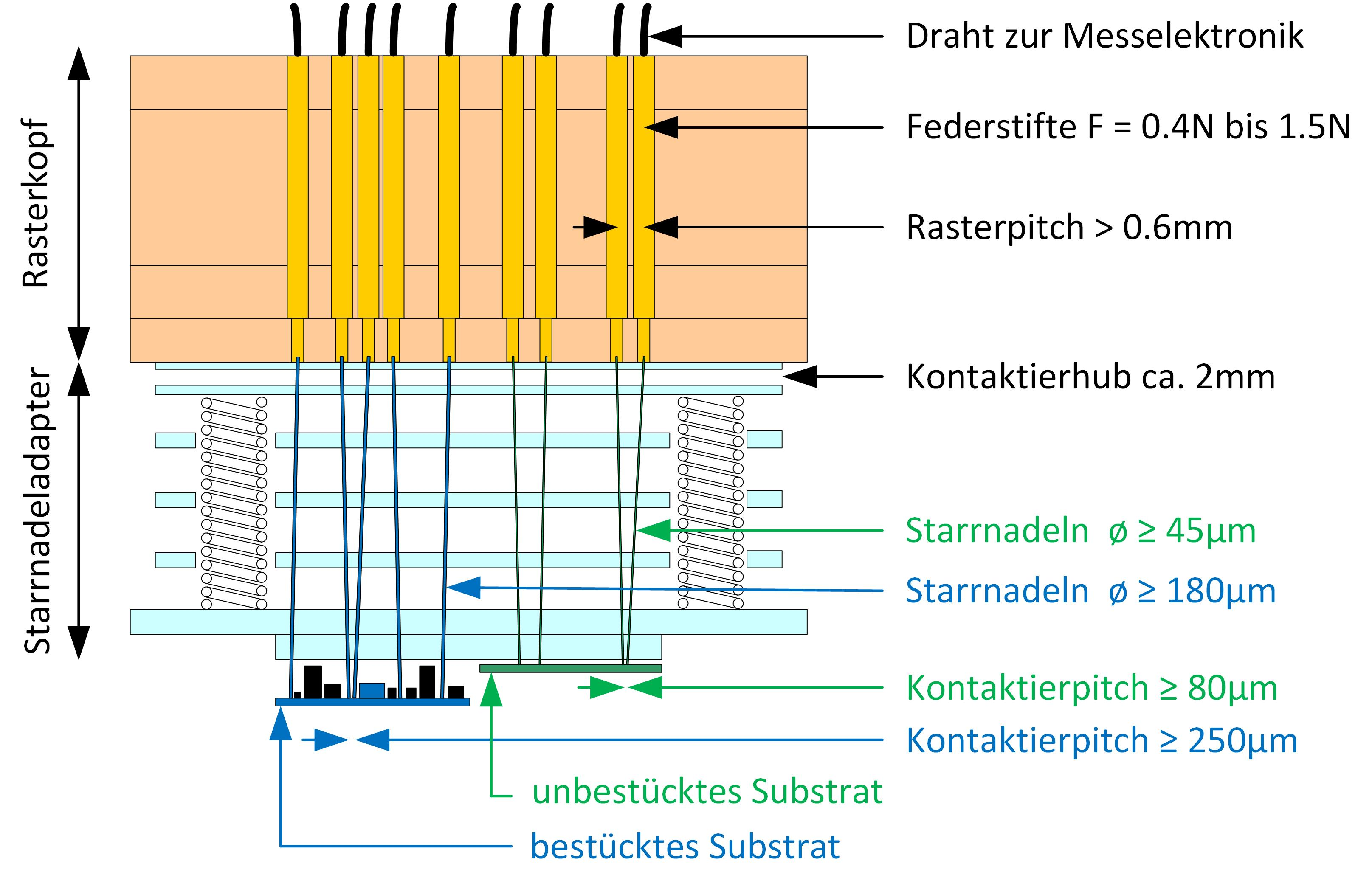 Möglicher Aufbau eines Starrnadeladapters. Auf der linken Seite ist das Kontaktieren auf ein bestücktes Substrat zu sehen, auf der rechten Seite das Kontaktieren von einem unbestückten Substrat.